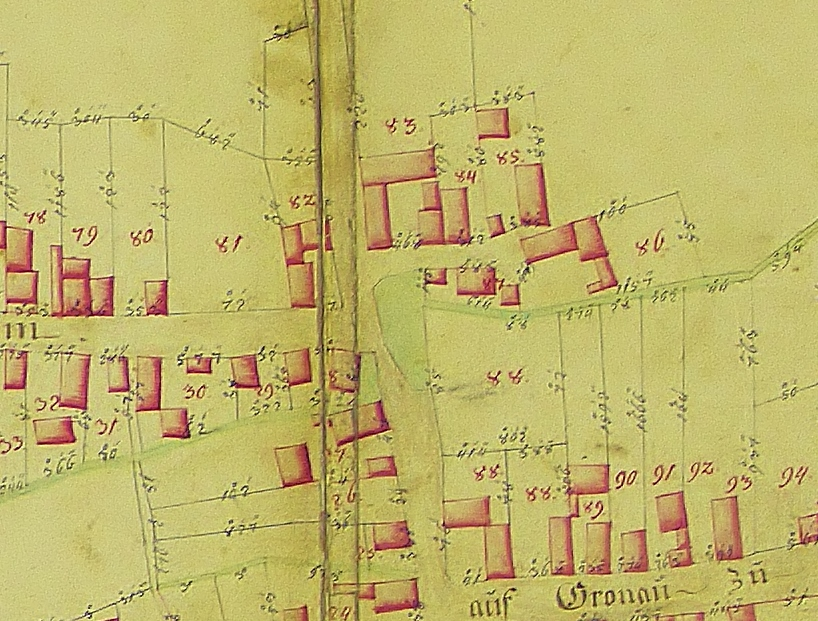 Ortskern Rödersheim 1776 nit dem teilweise zugeschüttetem Dorfteich und dem Dorfbach Stechgraben